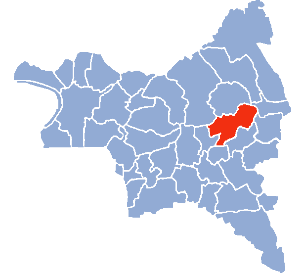 Auteur Hervé SUAUDEAU Licensing Catégorie:Cartes de Seine-saint-Denis